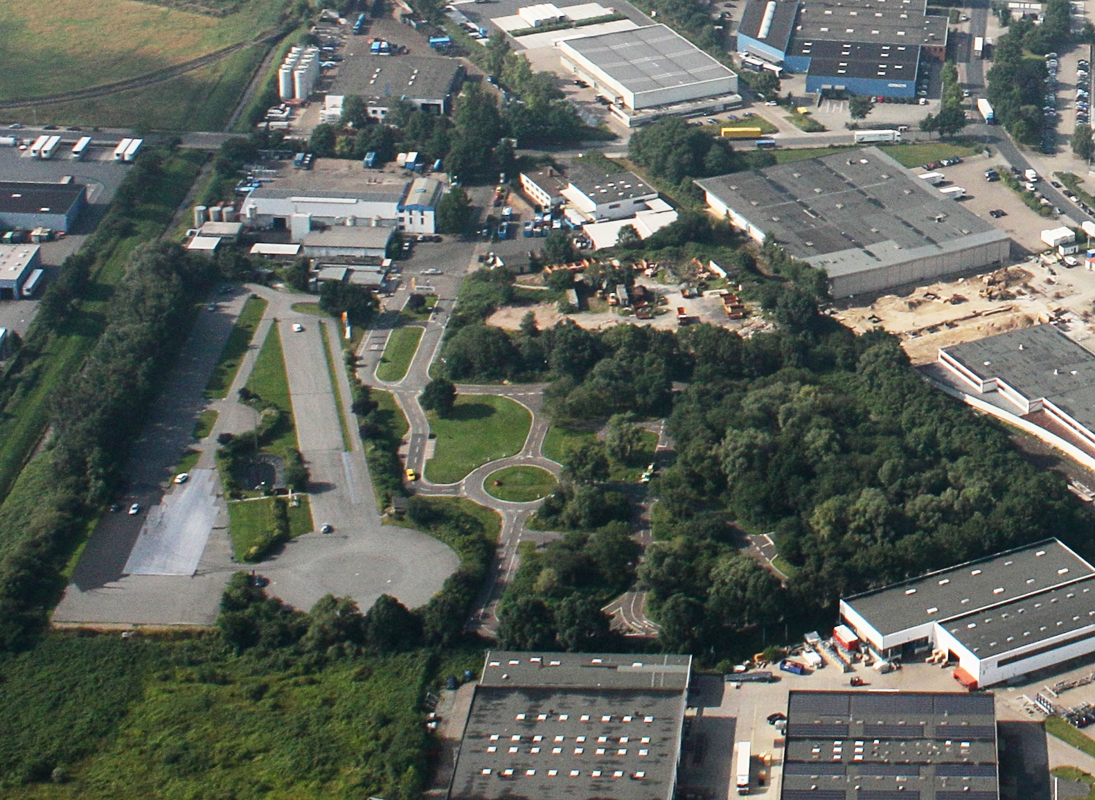 Luftaufnahme Bremen; entlang der A27 vom Weserpark (Bremer Kreuz; Blick aus der linken Flugzeugseite) zur Uni Bremen mit einem kleinen Abstecher zum Krankenhaus Bremen Ost; Flughöhe 500 m